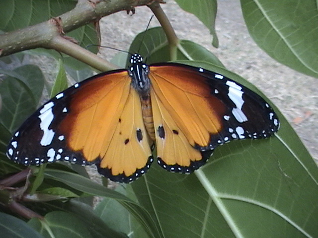 Plain tiger male upper side newly emerged